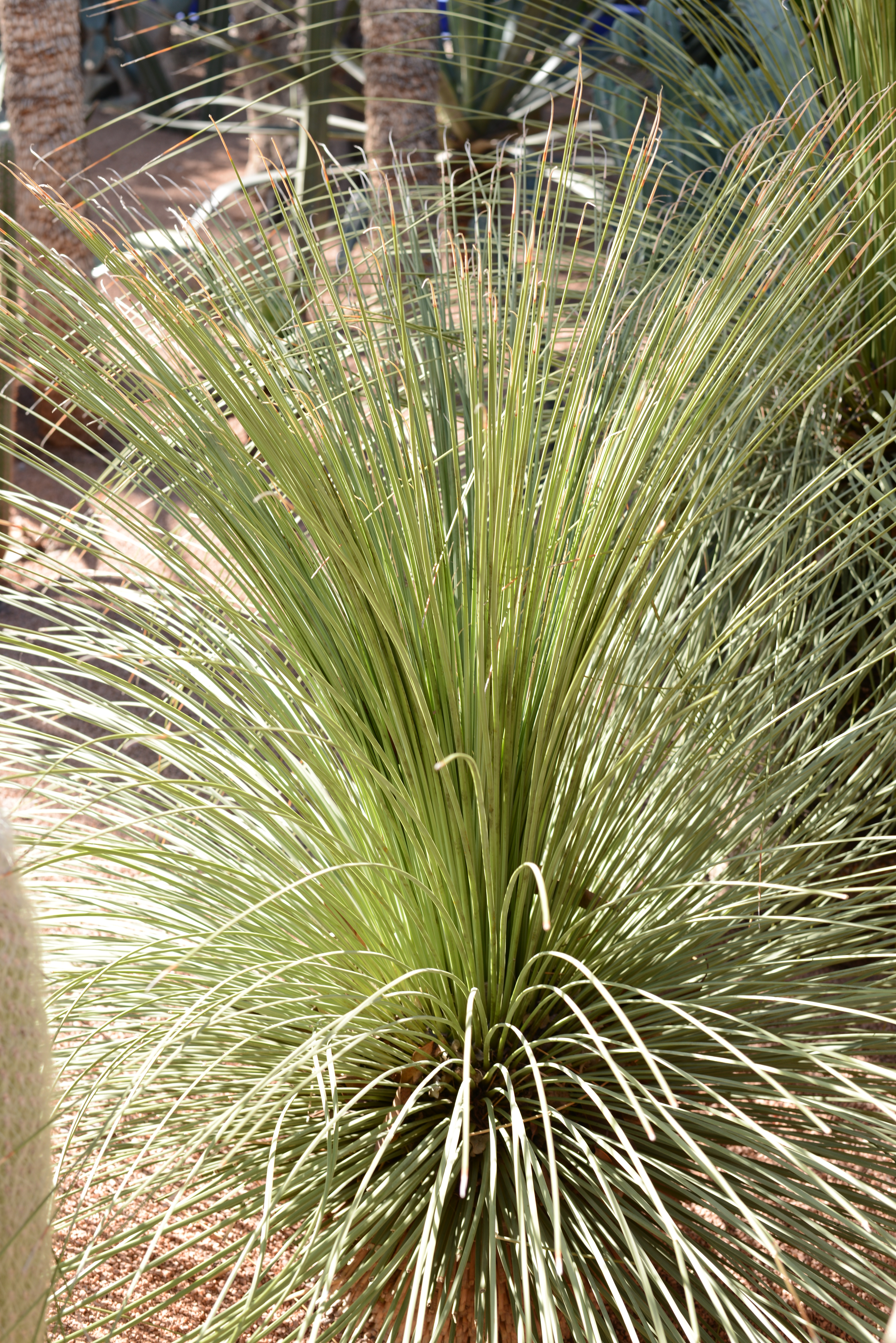 Agave stricta (jardin Majorelle, Marrakesh)